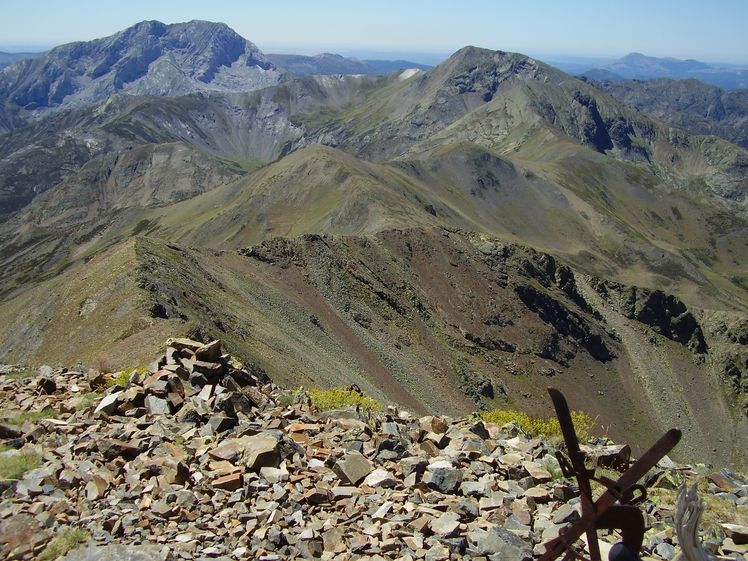 Vista del cordal del pico Cuartas al pico Murcia, en la Montaña Palentina (España).Al fondo, el pico Espigüete